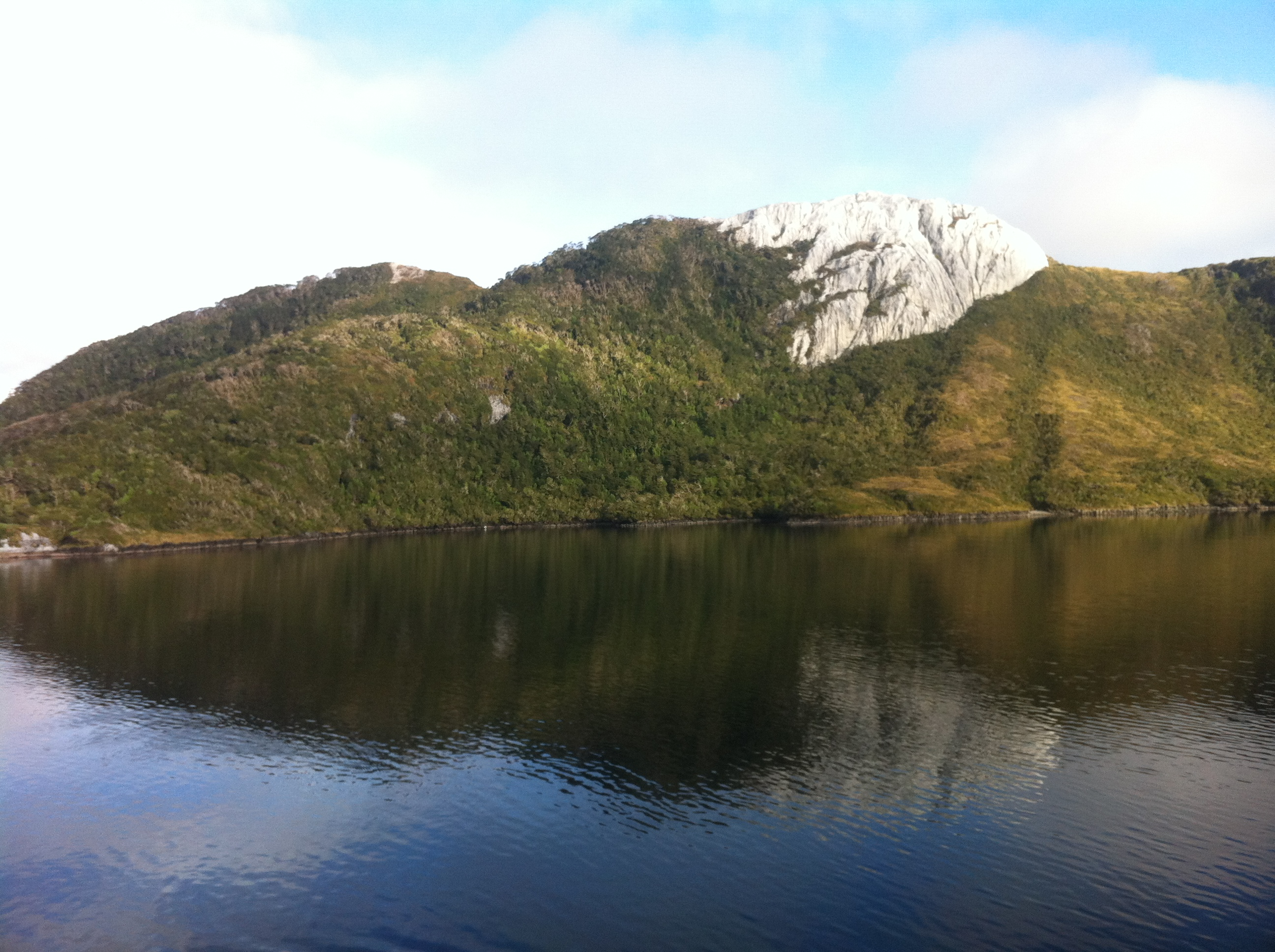 Foto tomada por Carlos Pedraza